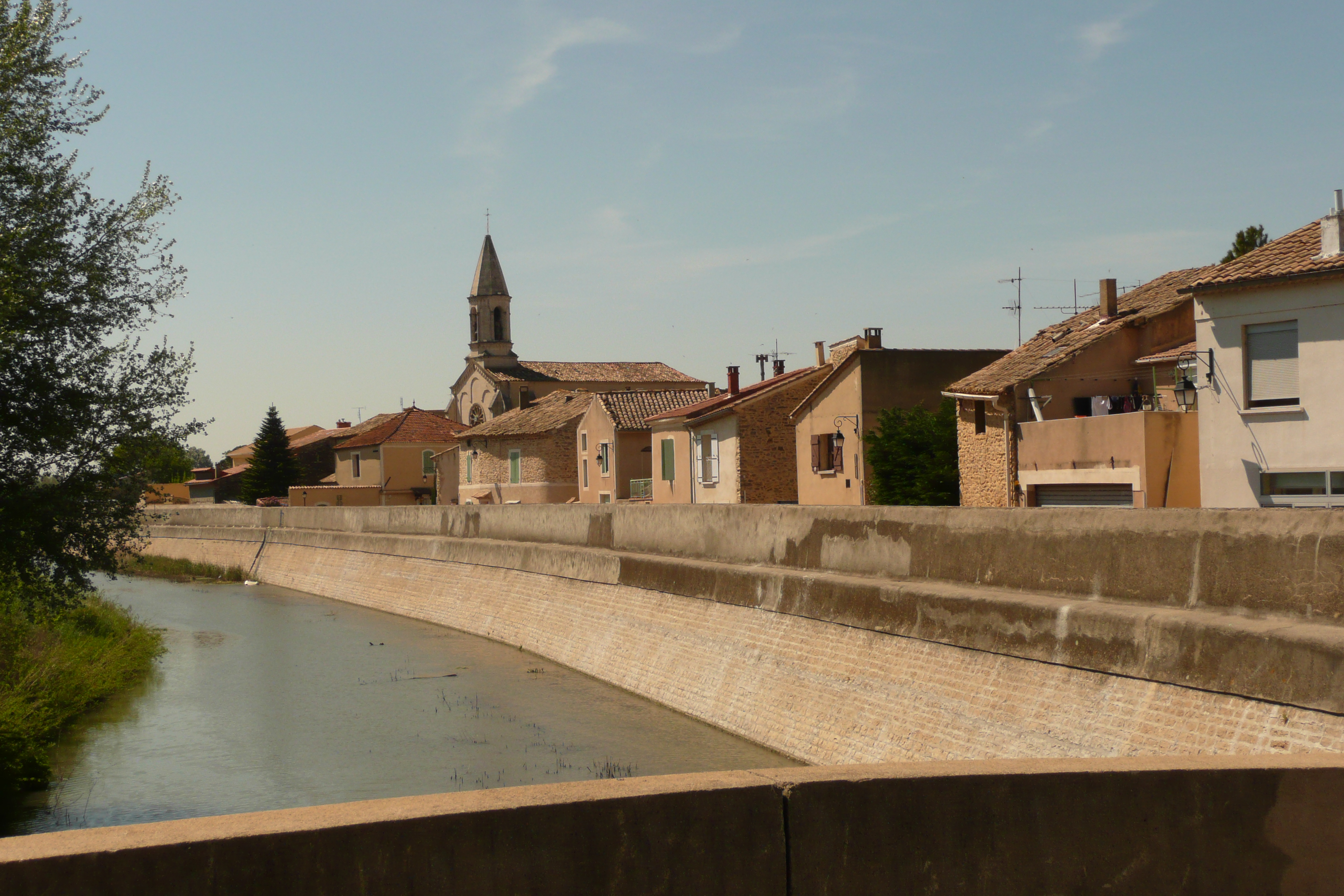 Codolet.